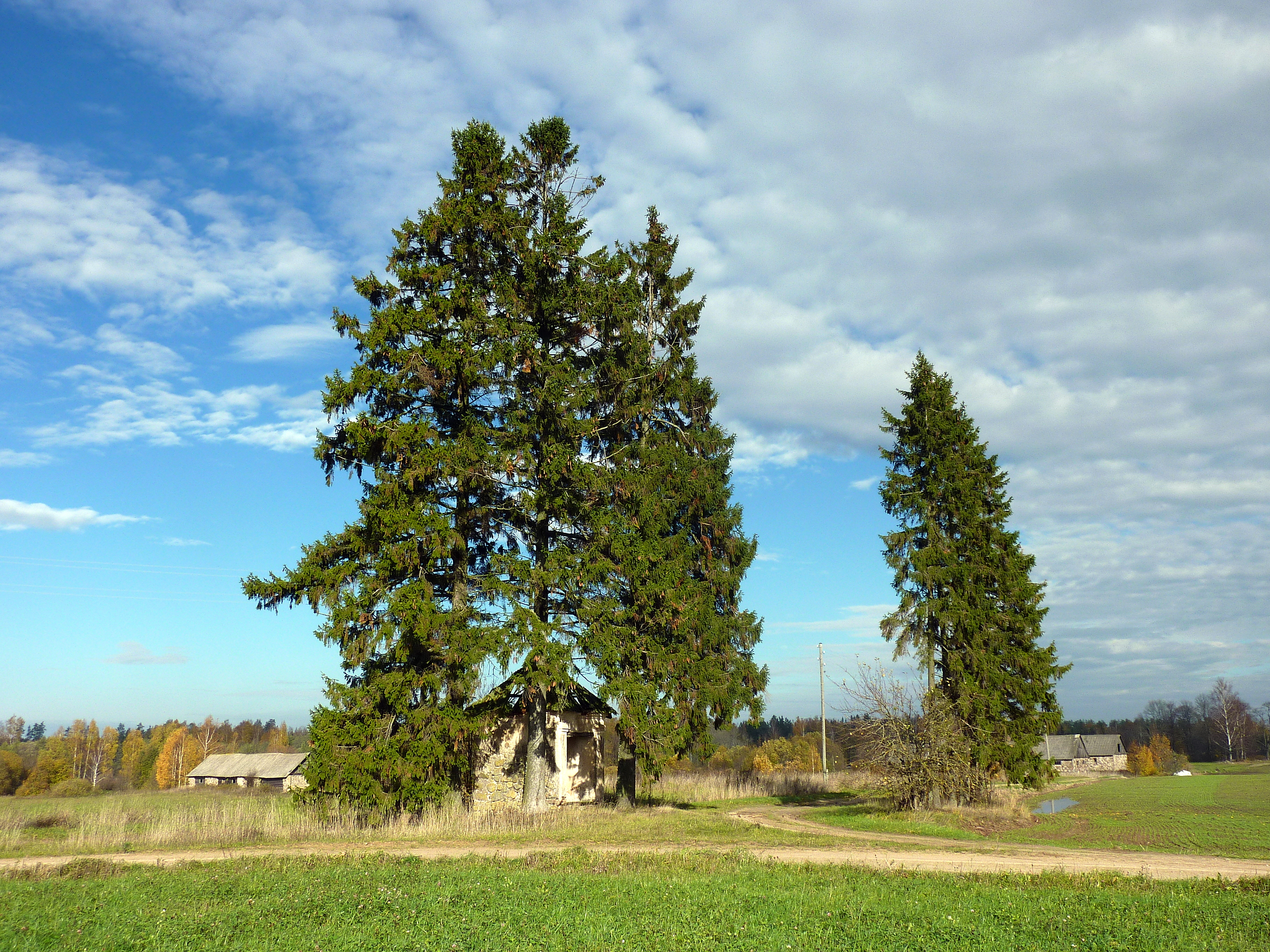 Pozostałości majątku Stefanpol k. Rybiniszek (Łatgalia)